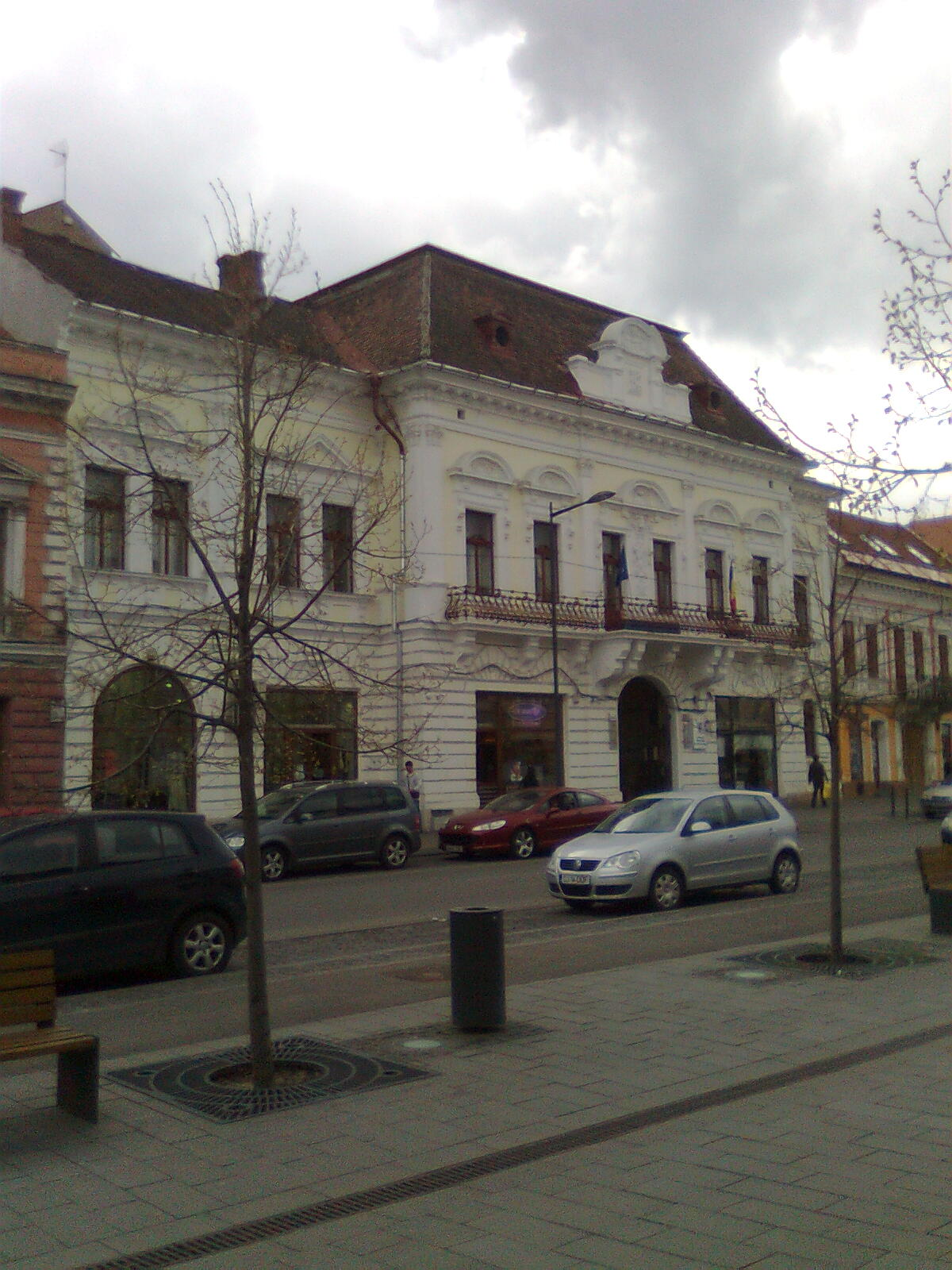 Az 1833-ban alapított Kolozsvári Casino épülete ma, Deák Ferenc (Eroilor) utca 16.